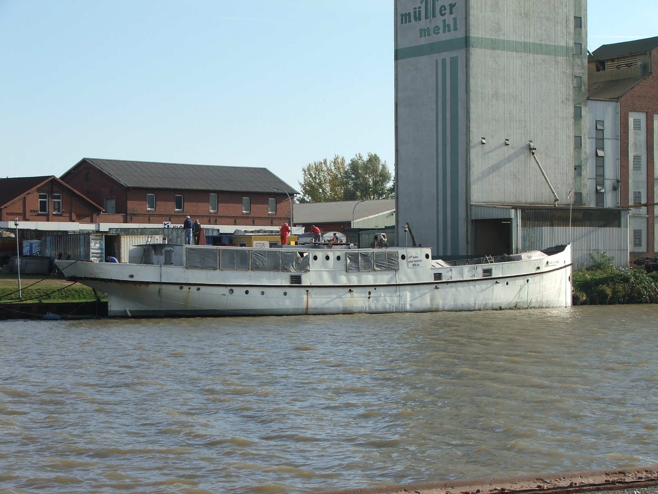 Museumsdampfer Prinz Heinrich von 1909 Ship Type: Post- and Passenger steamship Design by: Order date: Built by: Meyer-Werft, Papenburg, Germany Yard No: S.240 Keel laid: Launch date: Date of completion: 1909 Length over all: 37 m LPP: m Beam: 7 m Draught: 1,80 m GRT: 212 DWT: NET: Main engine: 2x 150 HP Steamengine Speed: kn History 1909 Named: PRINZ HEINRICH for Borkumer Kleinbahn & Dampfschiffahrts AG Flag: Germany 1953 Sold Renamed: HESSEN for Rederei AG-Ems Flag: Germany 1958 Refit with diesel engine 1970 Out of service and sold as Museumship in Lübeck. Renamed: MISSISSIPPI Flag: Germany 2002 Out of service, laid up in Rostock 2003 Sold to Verein „Traditionsschiff Prinz Heinrich“ e.V. Renamed: PRINZ HEINRICH Flag: Germany 2004 Start restauration in Leer.